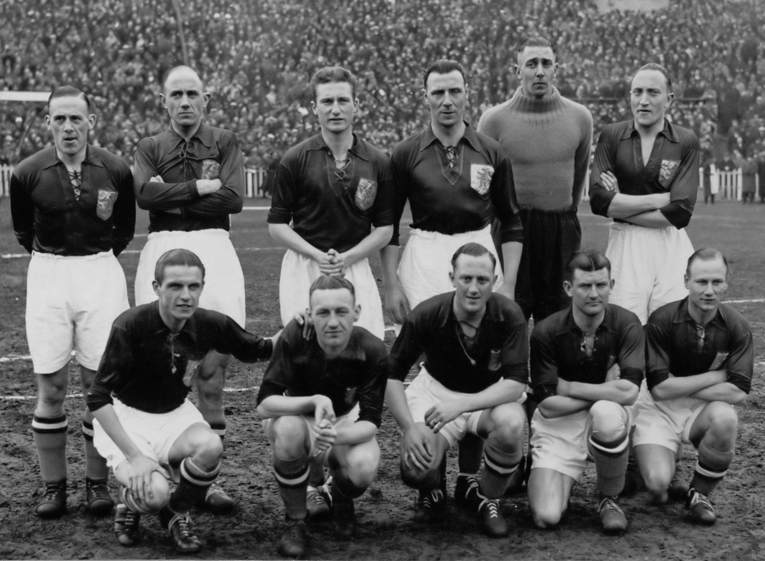 Het Nederlands elftal voor de interland tegen België. Staand, van links naar rechts: Henk Blomvliet, Bertus Caldenhove, Bob Stam, Wim Anderiesen, Adri van Male en Jan Schubert. Zittend: Guus Dräger, Freek van der Veen, Leen Vente, Kick Smit en Bertus de Harder. 19 maart 1939